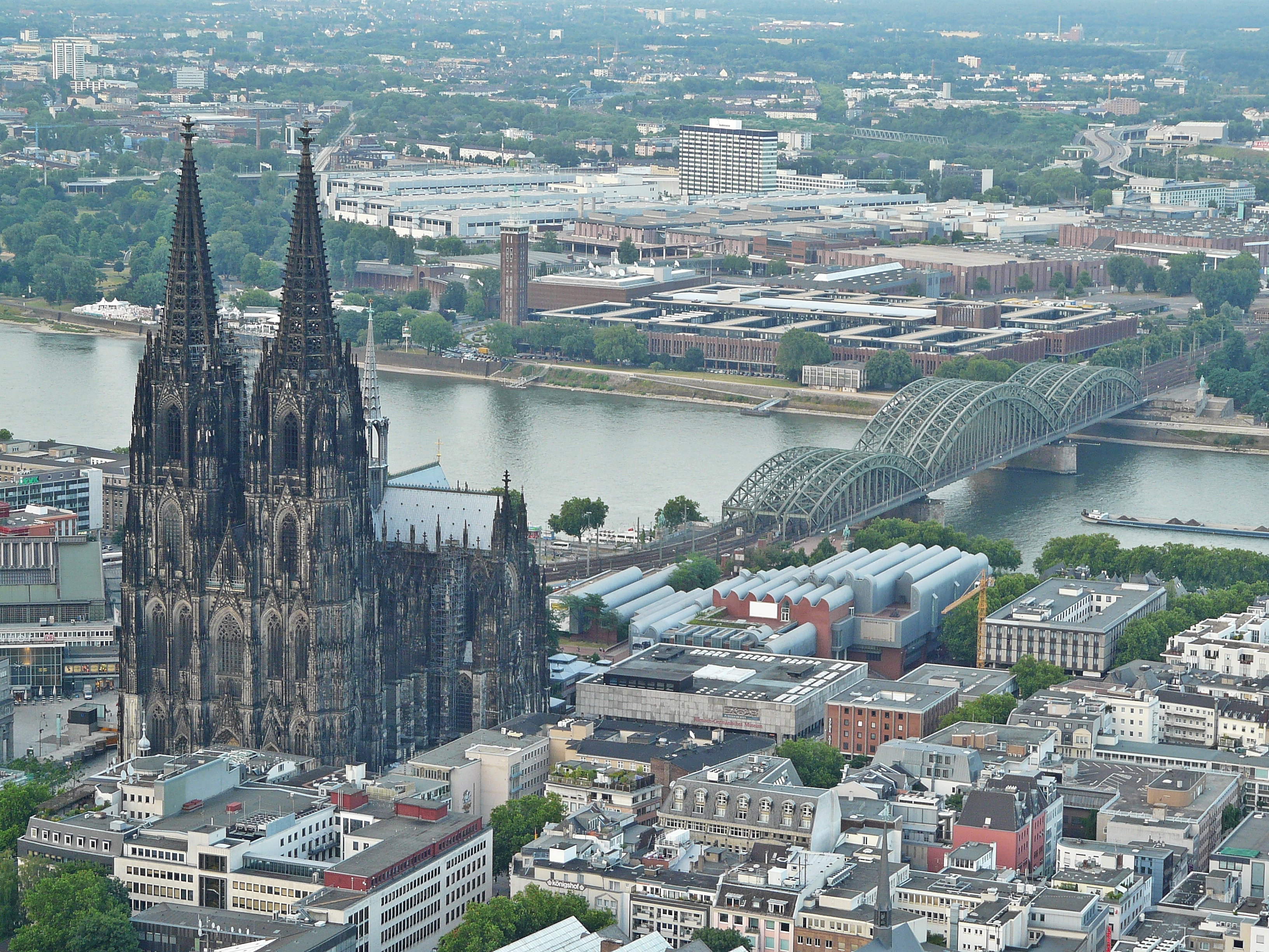 Kölner Dom, Hohenzollernbrücke und die Rheinhallen.